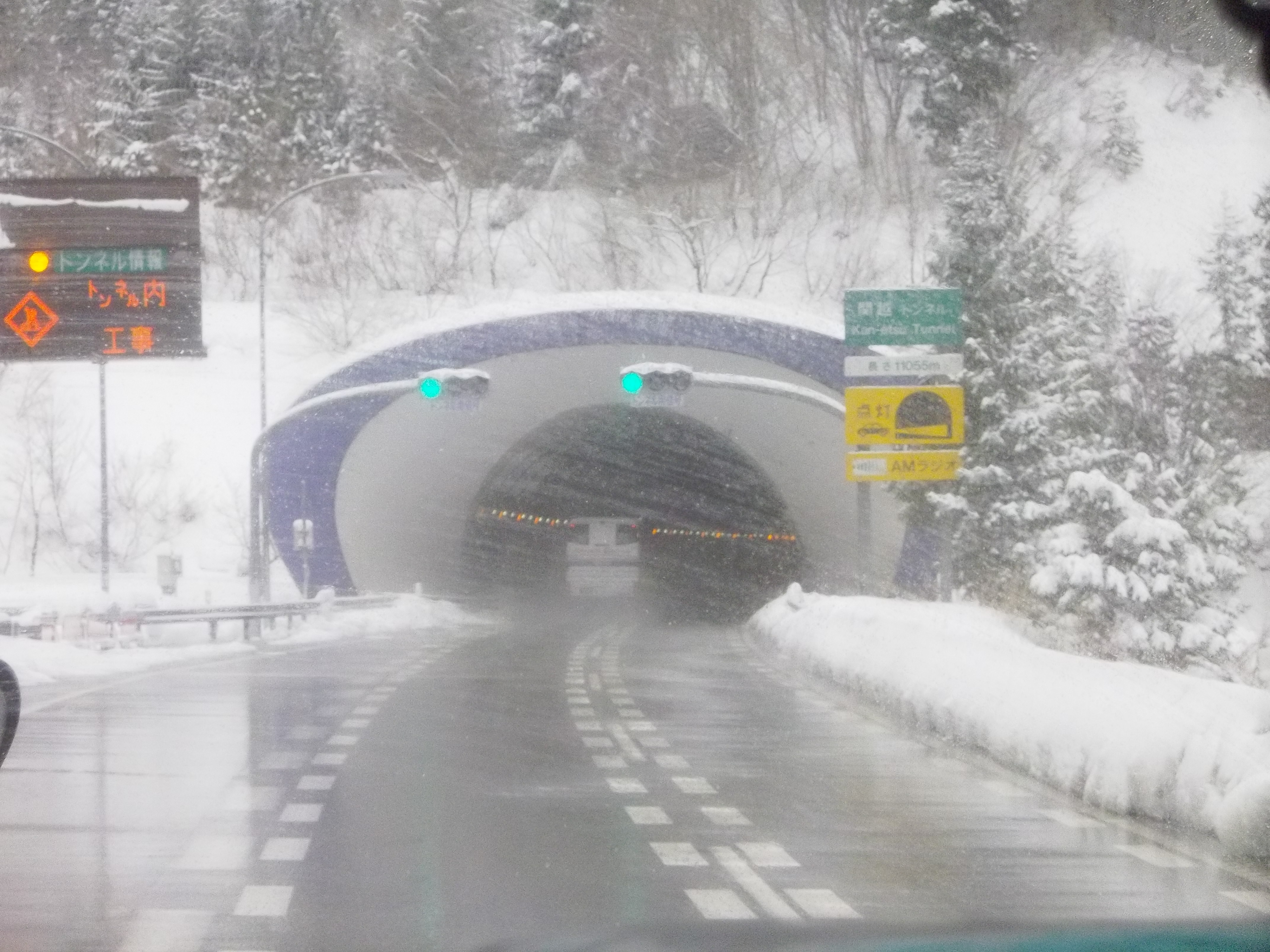 関越トンネル上り湯沢側